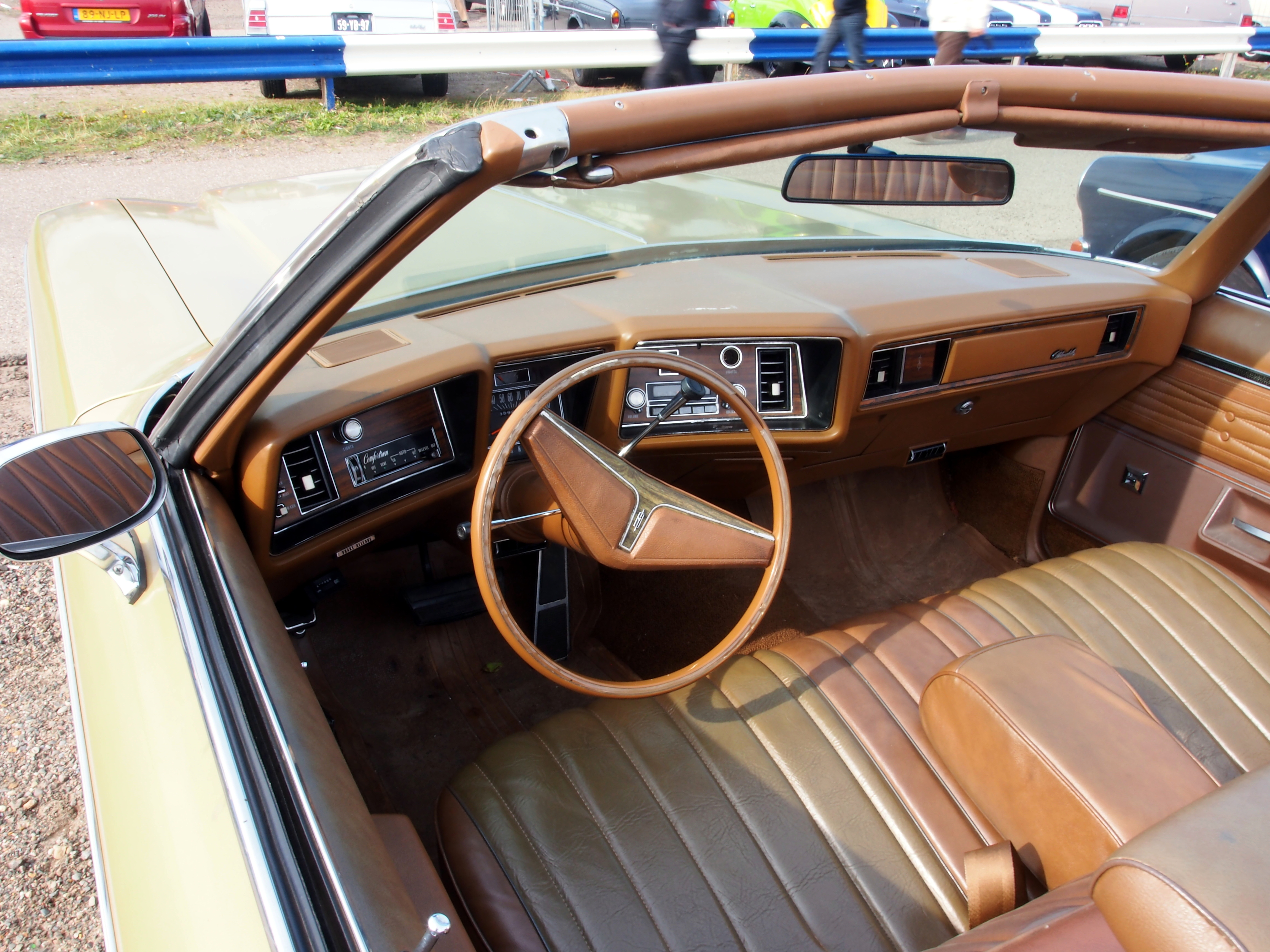 1972 Oldsmobile Delta 88 Royale